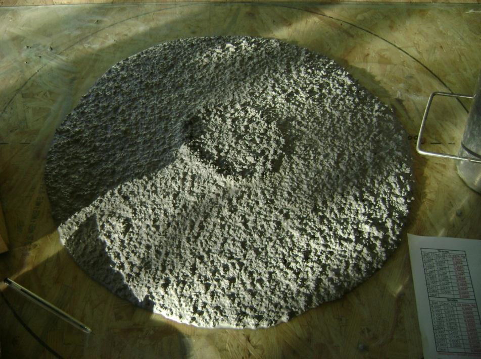 Superplastifikatora iedarbība uz svaiga betona plūstamību un izplūdes simetriju (noteikts ar konusa nosēduma metodi pēc LVS EN 12350-2:2009).